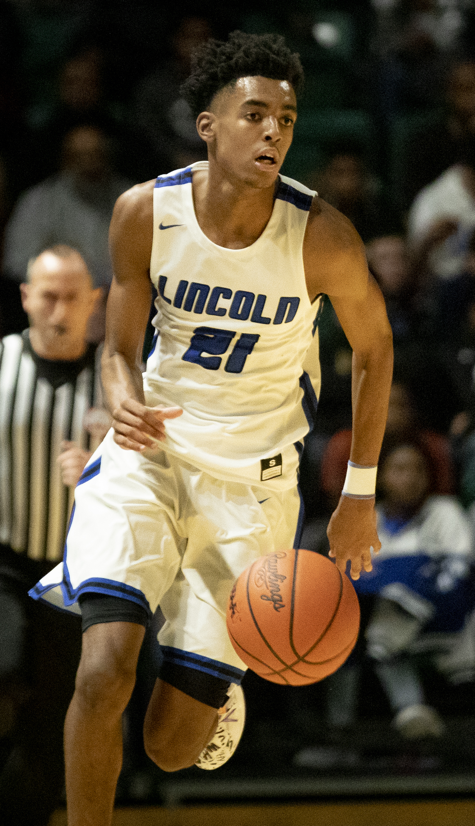 _O6A5198